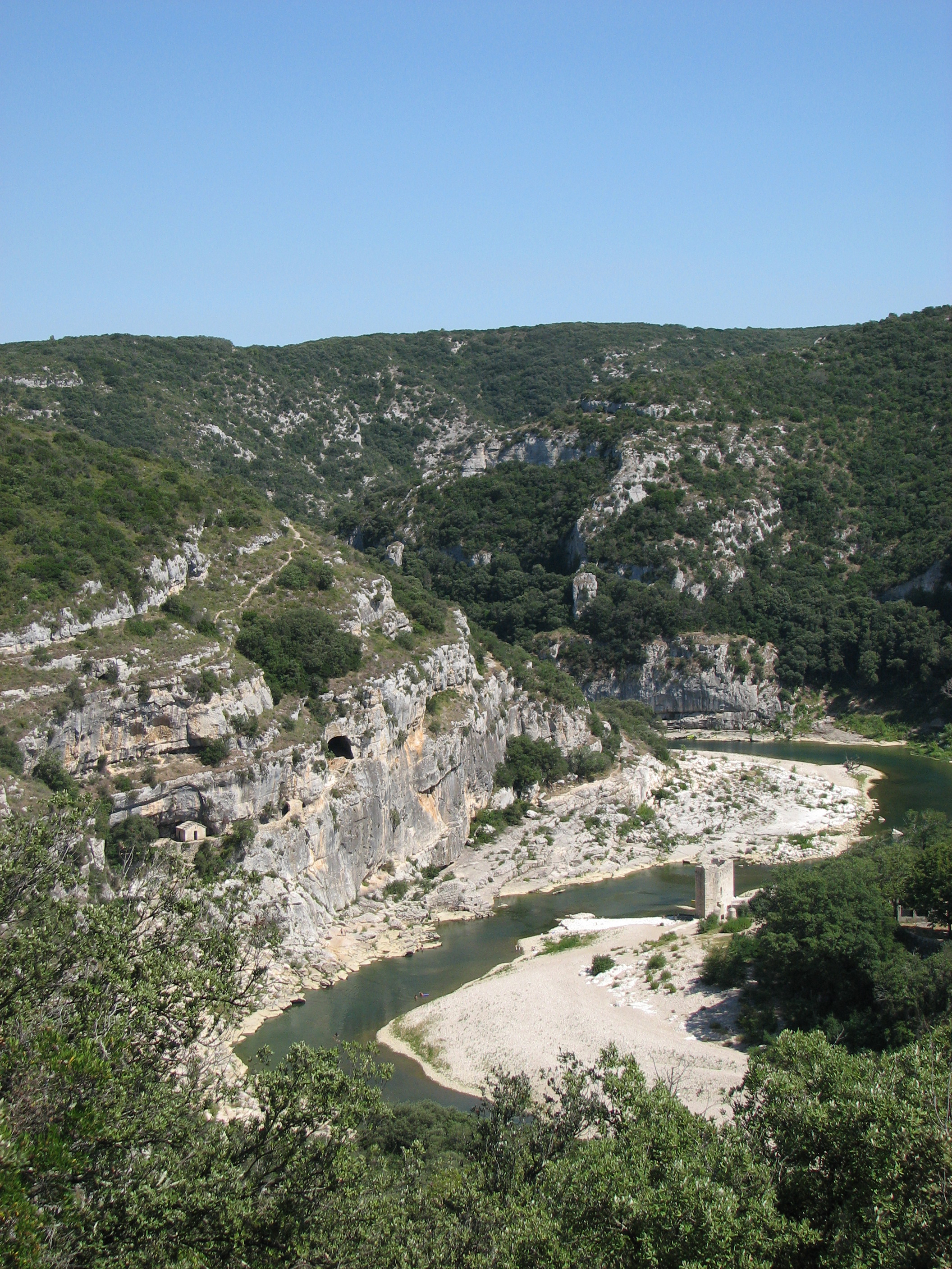 Les gorges du Gardon près de Sanilhac (Gard)